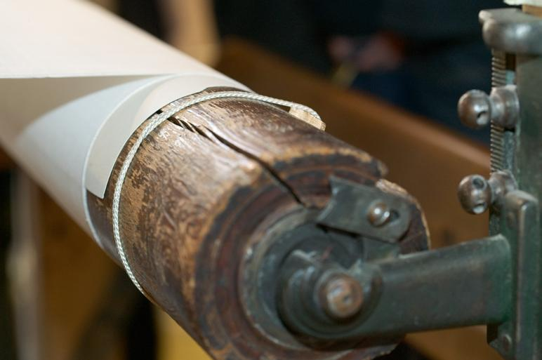 Bom. Motiv: Almgrens sidenväveri Kategori: Väveri, Museum Bom.